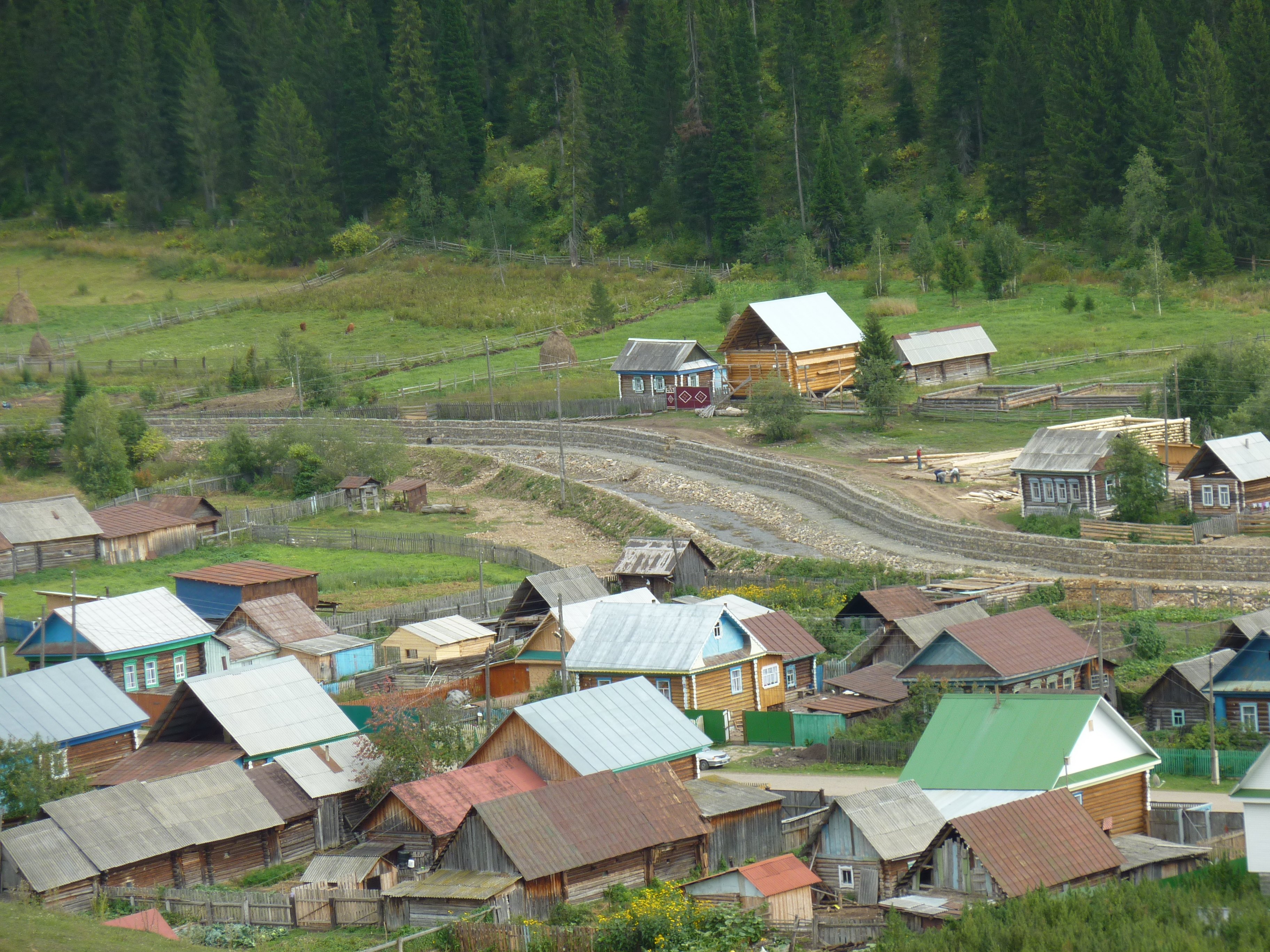 Речка Юрмаш в каменных берегах